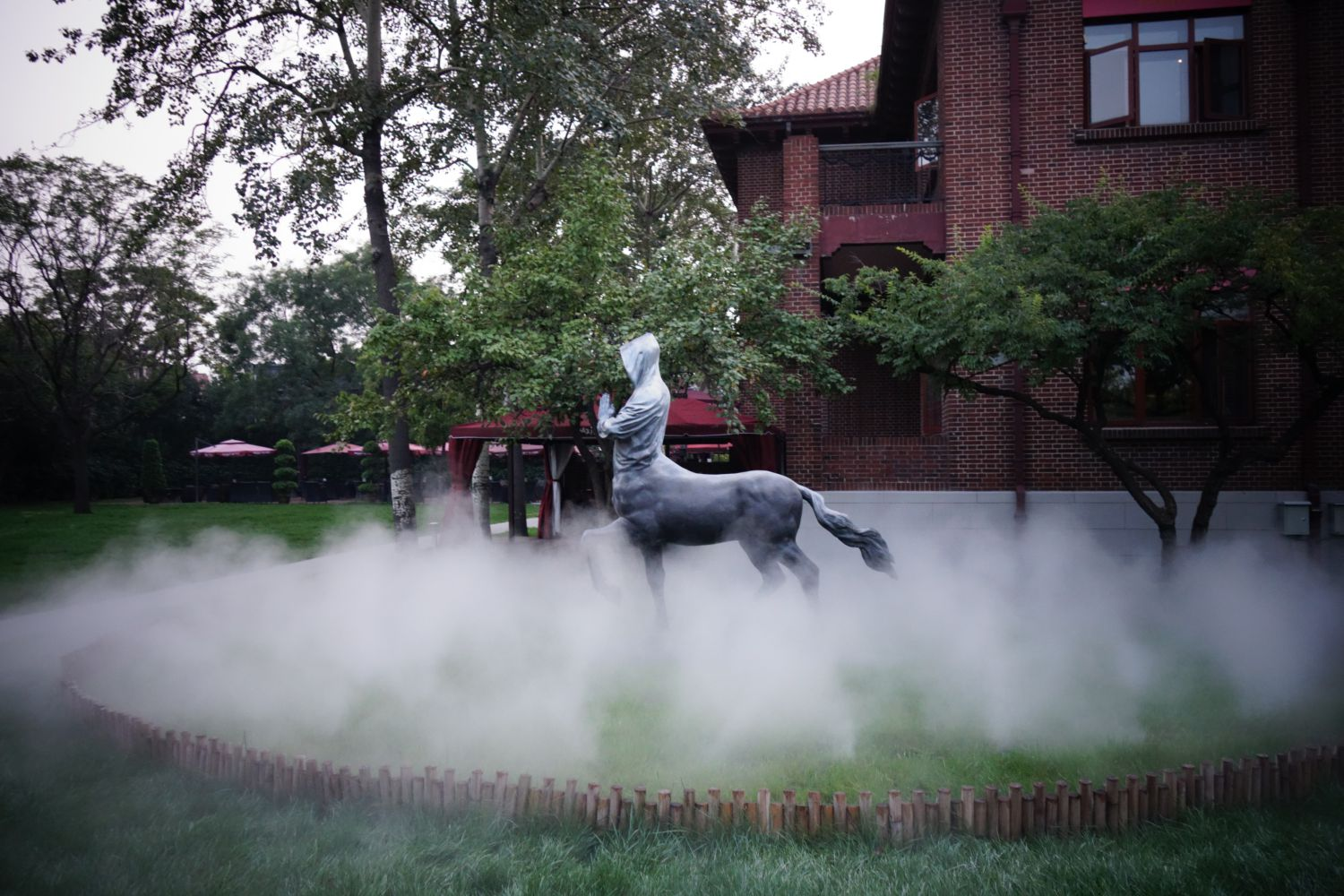 中文（中国大陆）: 天津五大道马克西姆餐厅